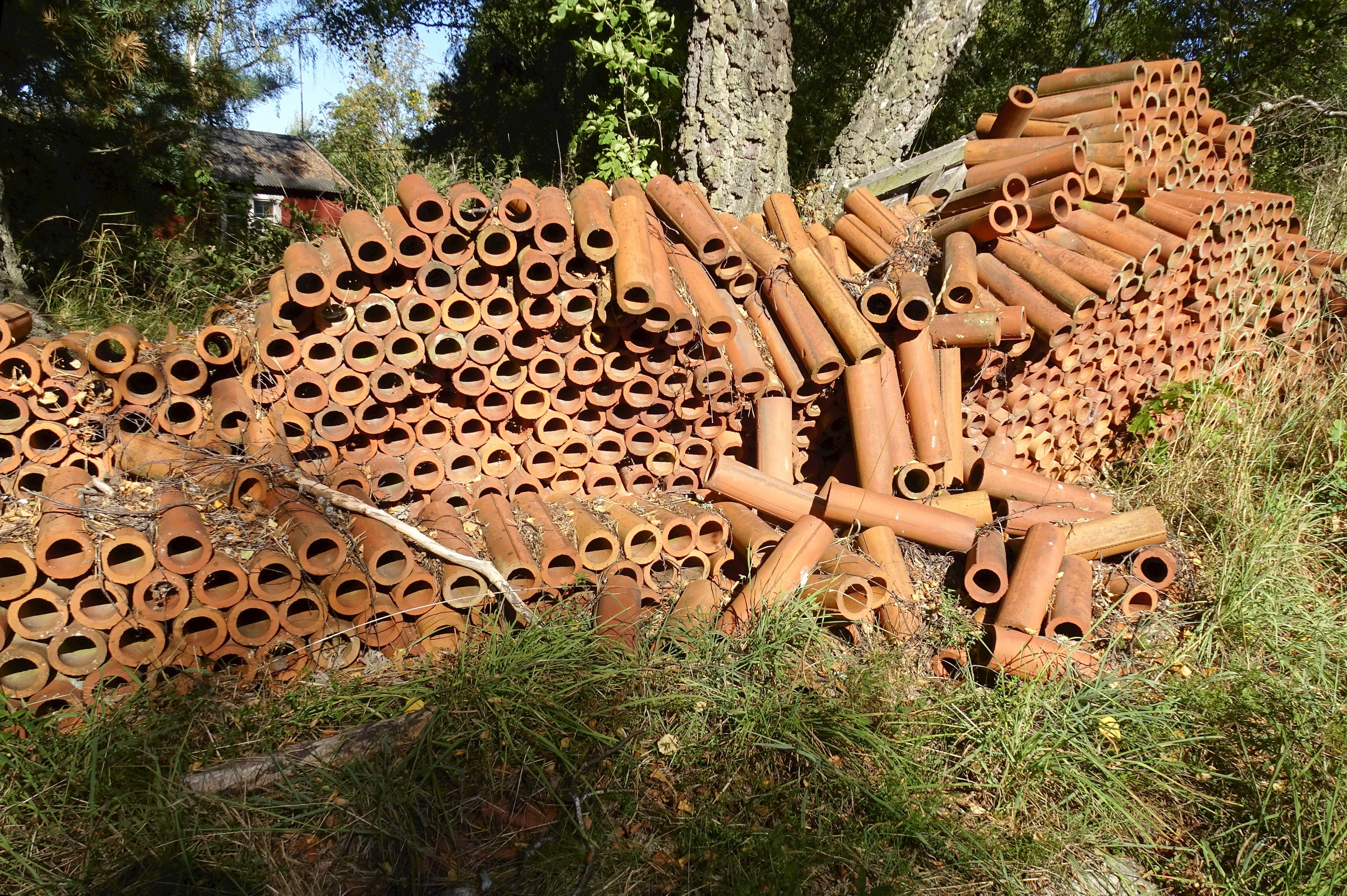 En stapel med tegelrör